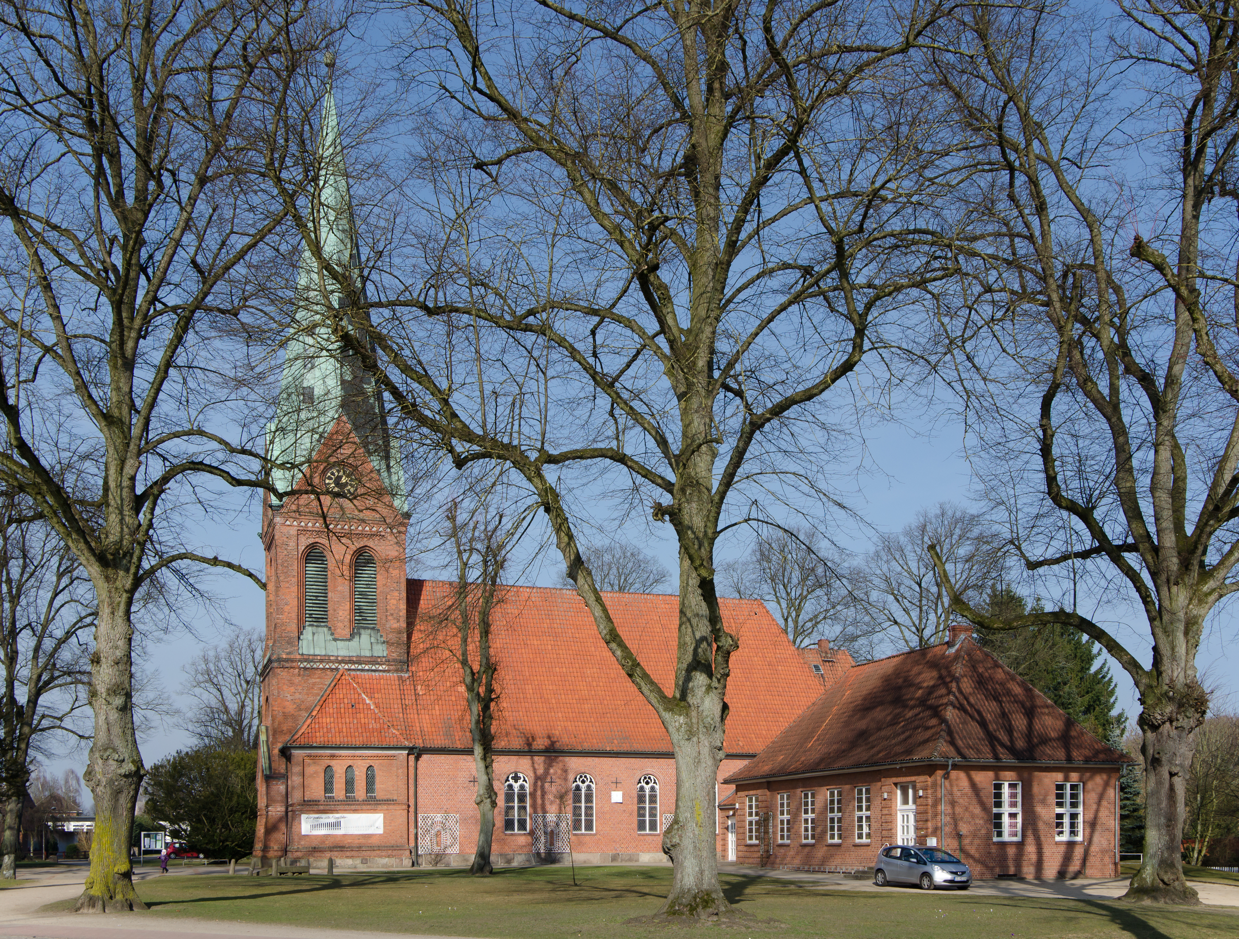 Trittau Martin-Luther-Kirche